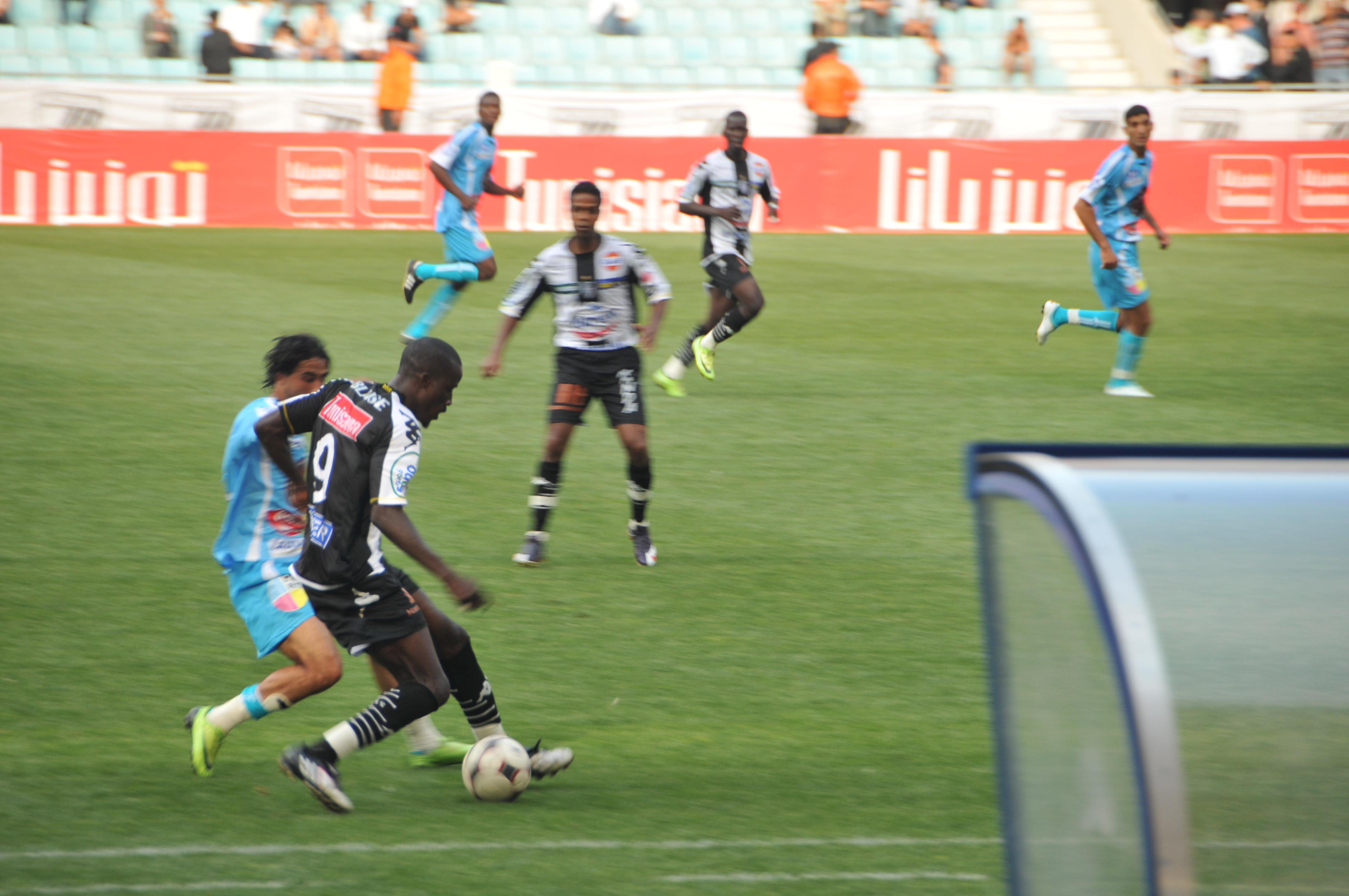 Finale de la coupe de Tunisie 2009 (USM - CSS), Stade olympique 7 novembre de Radès, Tunisie